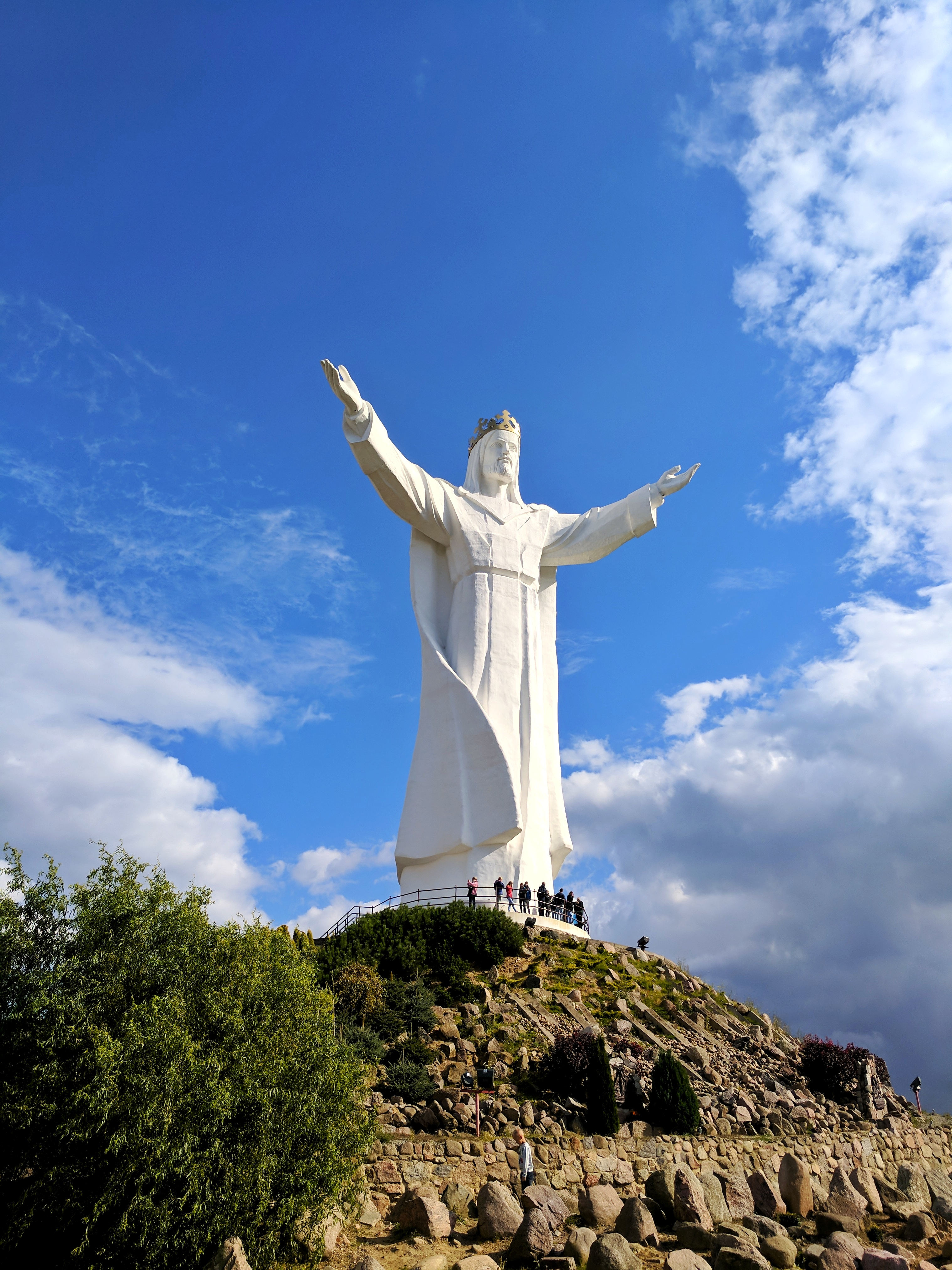 pomnik Chrystusa w Świebodzinie